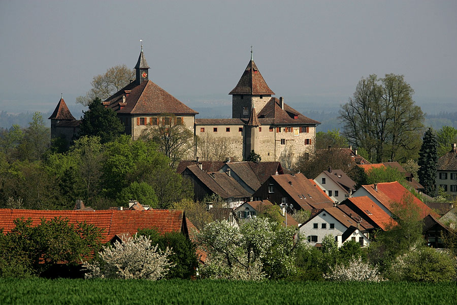 Kyburg mit Schloss